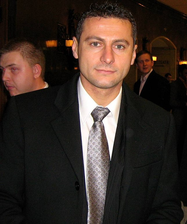 Piotr Świerczewski (ur. 8 kwietnia 1972 w Nowym Sączu), polski piłkarz